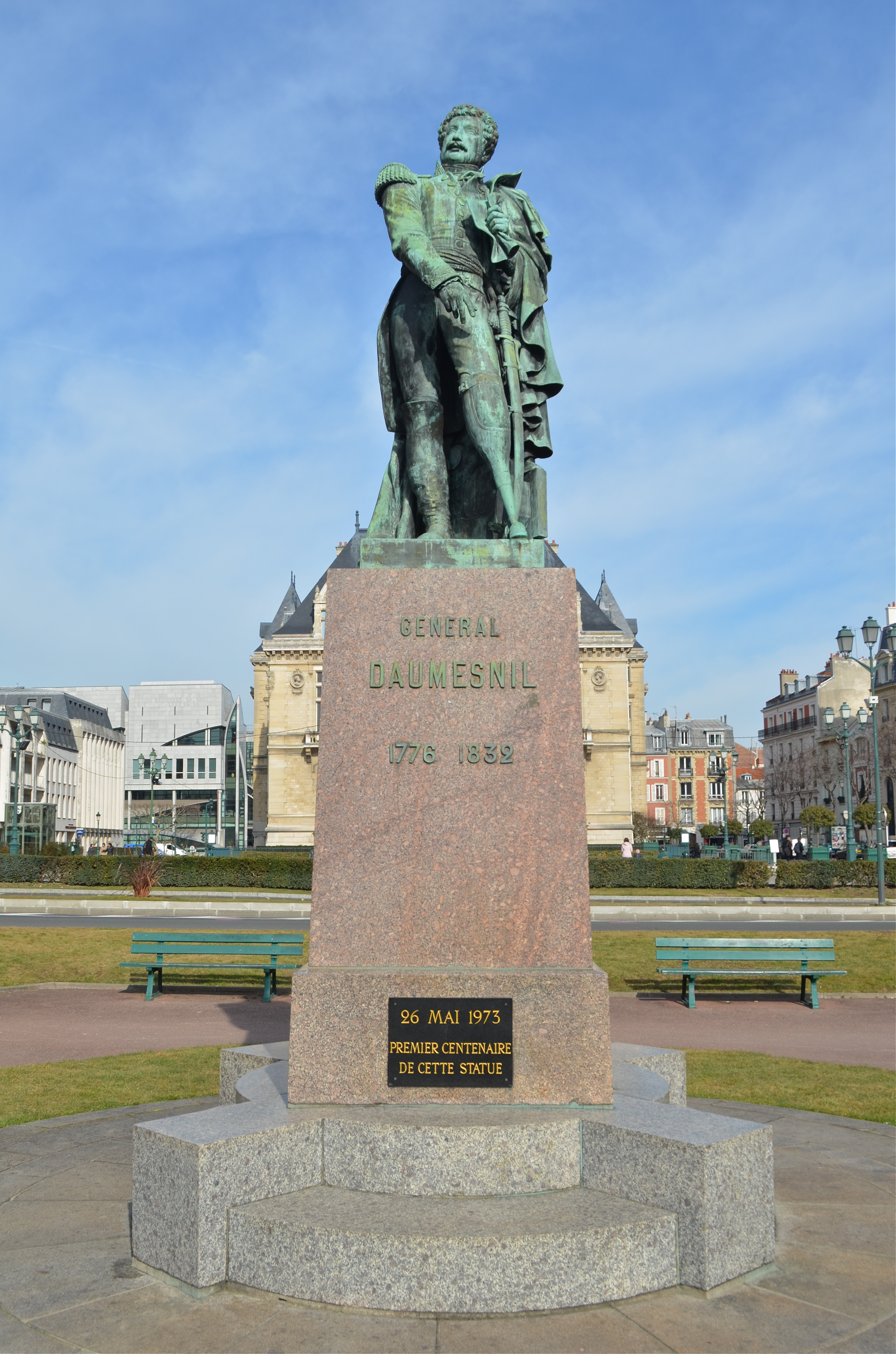 Statue en bronze de Pierre Daumesnil sculptée par Louis Rochet et fondue par M. Matifat (1873) -Cours Marigny, Vincennes (Val-de-Marne)